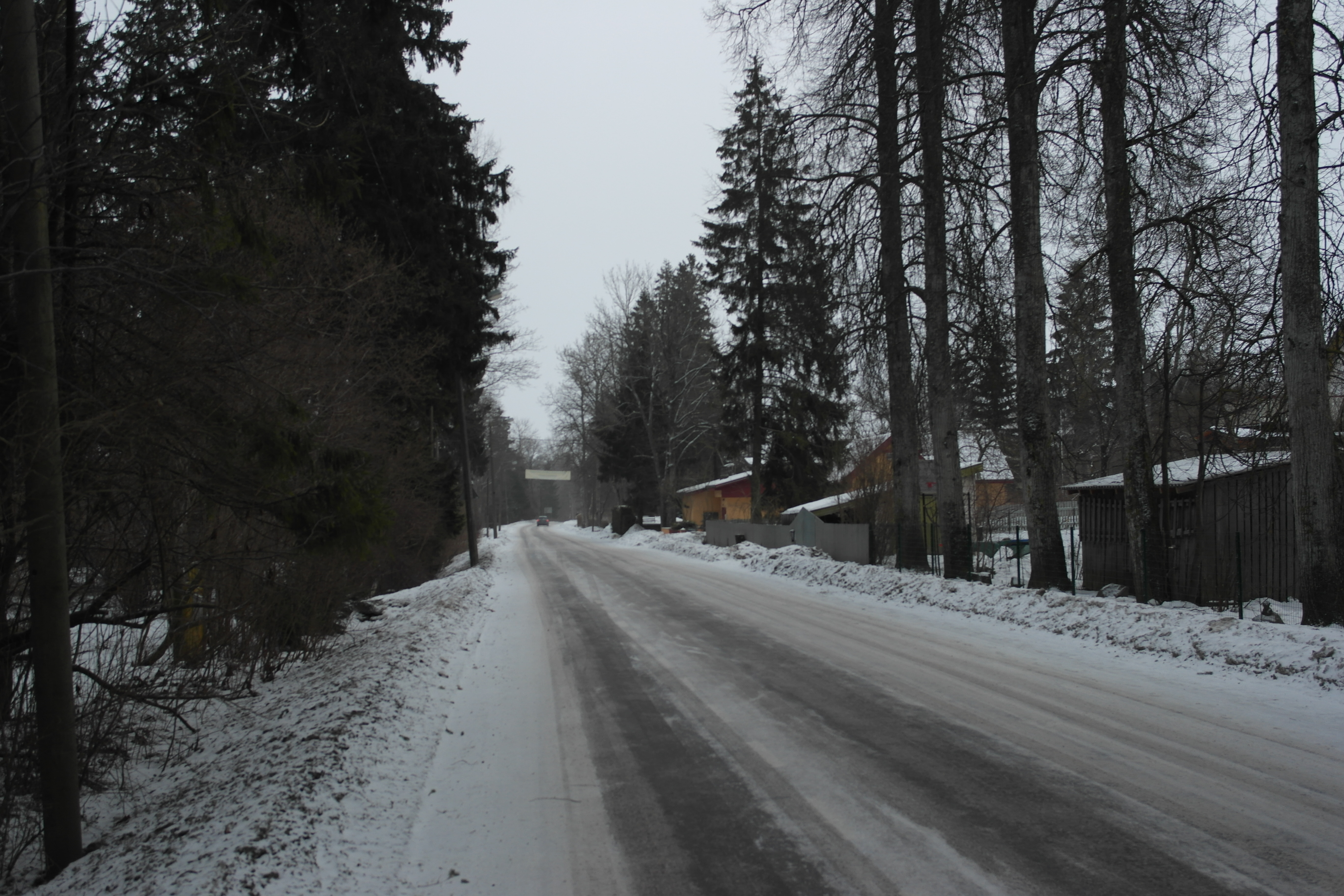 Aruküla Tallinna mnt.